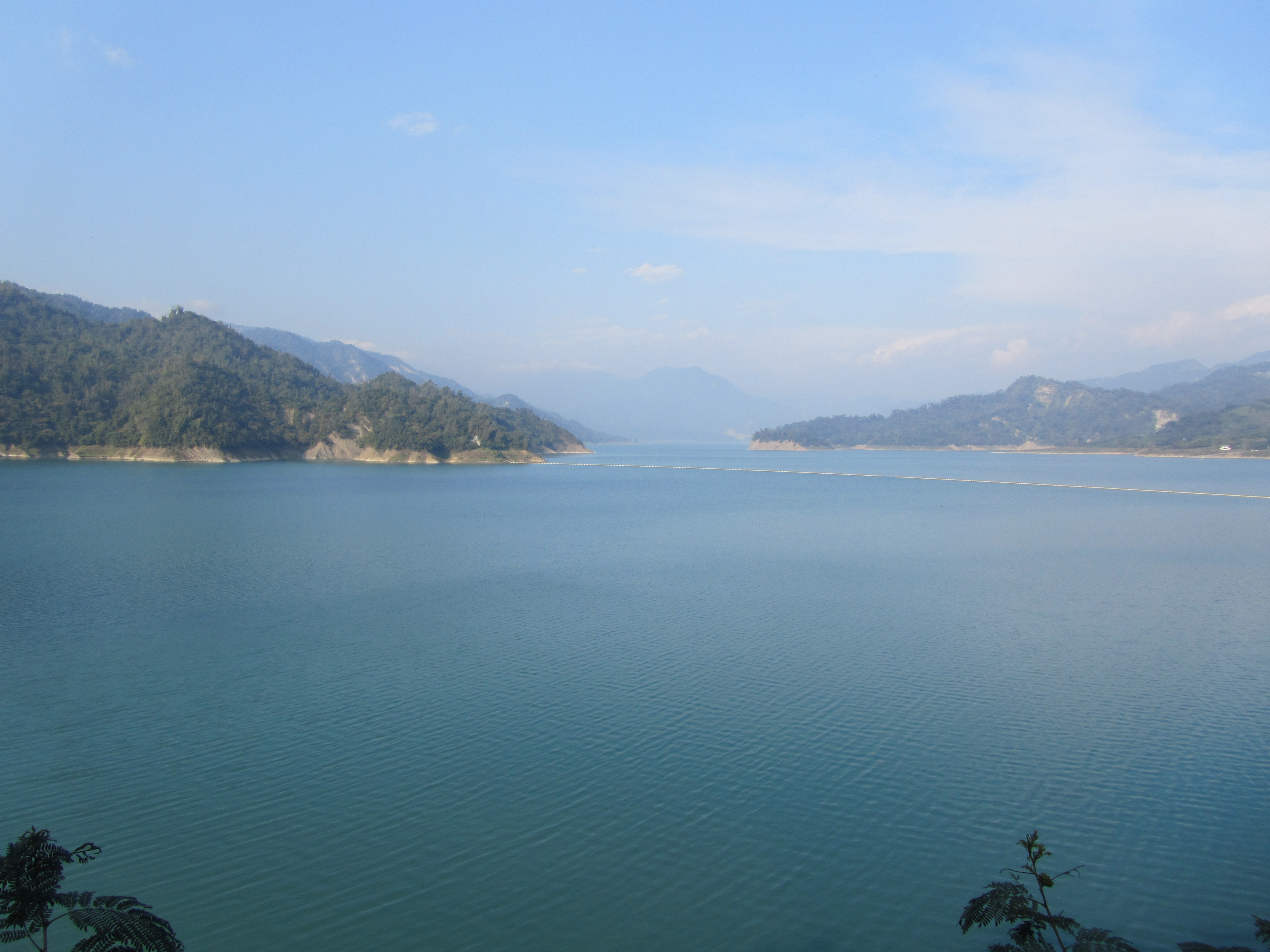 2012年1月30日，自觀景涼亭旁望曾文水庫。